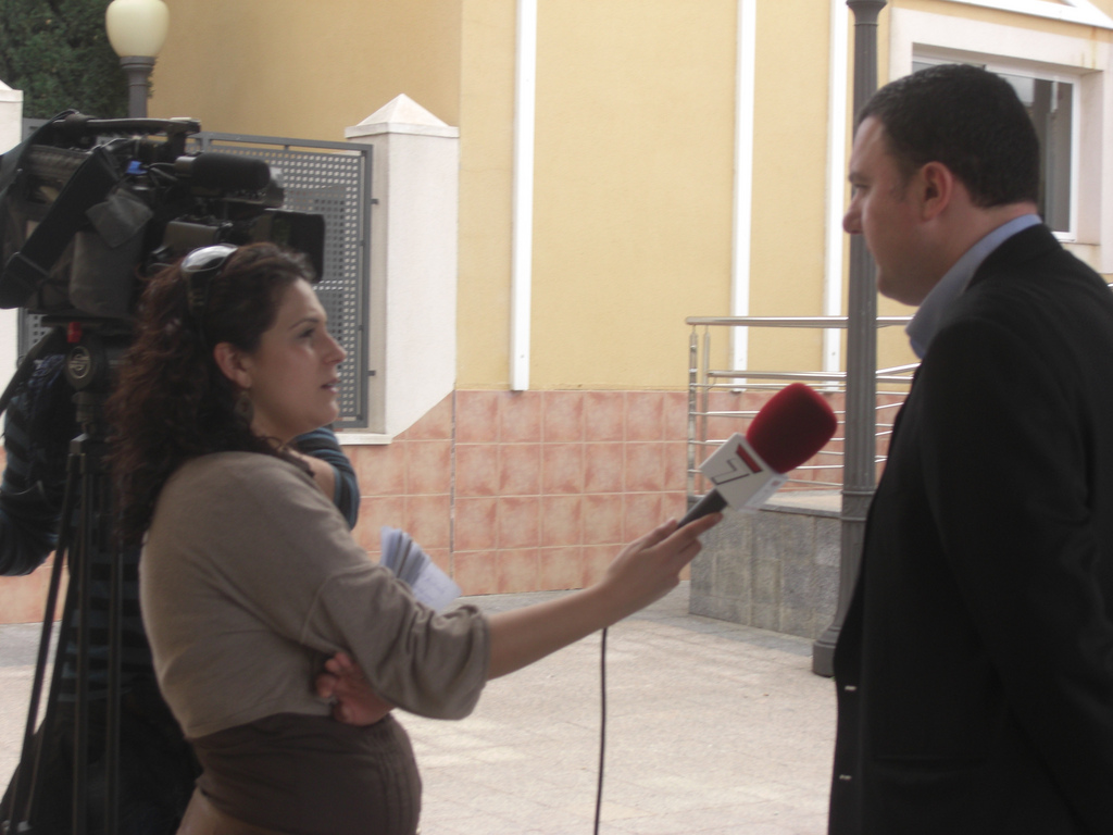 Reportera en Universidad Católica de San Antonio, 2008.